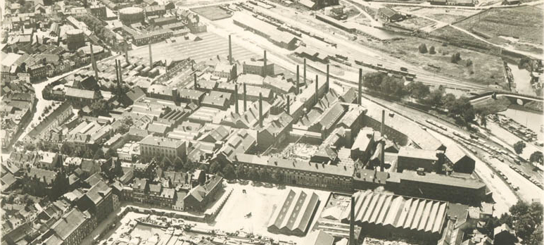 Luchtfoto van het Bassin en de Boschstraat en omgeving in Maastricht in 1927. In het midden het fabriekscomplex van de "Sphinx" tussen Bassin (beneden), Achter de Barakken - Maagdendries (links) en de Frontensingel (rechtsboven). Linksboven het complex van Gemeentebedrijven met onder andere drie gashouders, rechtsboven de nieuwe gasfabriek, rechtsbeneden het emplacement van de stoomtramlijnen aan de Nieuwe Havenkom (midden rechts).